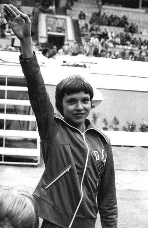 Maxi Gnauck ADN-ZB Mittelstädt 17.10.83 Berlin: Vorbereitung 22. Turnweltmeisterschaften vom 23. bis 30. Oktober 1983 in Budapest -Die 19jährige Maxi Gnauck (Foto von einem früheren Wettkampf) steht an der Spitze des DDR-Damenaufgebots für die diesjährigen Titelkämpfe. Die Olympiasiegerin am Stufenbarren hat in der ungarischen Hauptstadt drei Titel der Weltmeisterschaft von Moskau 1981 (Pferdsprung, Stufenbarren und Schwebebalken) zu verteidigen. -Siehe auch 1983-1017-21 und 22 N